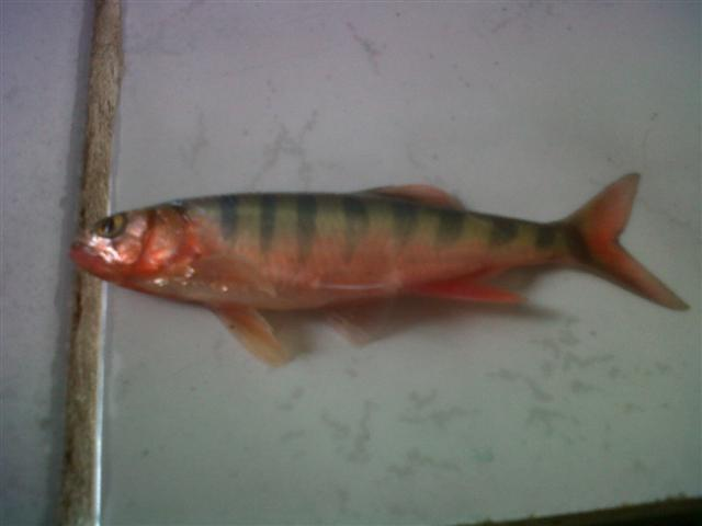 Opsaridium peringueyi South Africa, Malelane Mpumalanga 10 cm